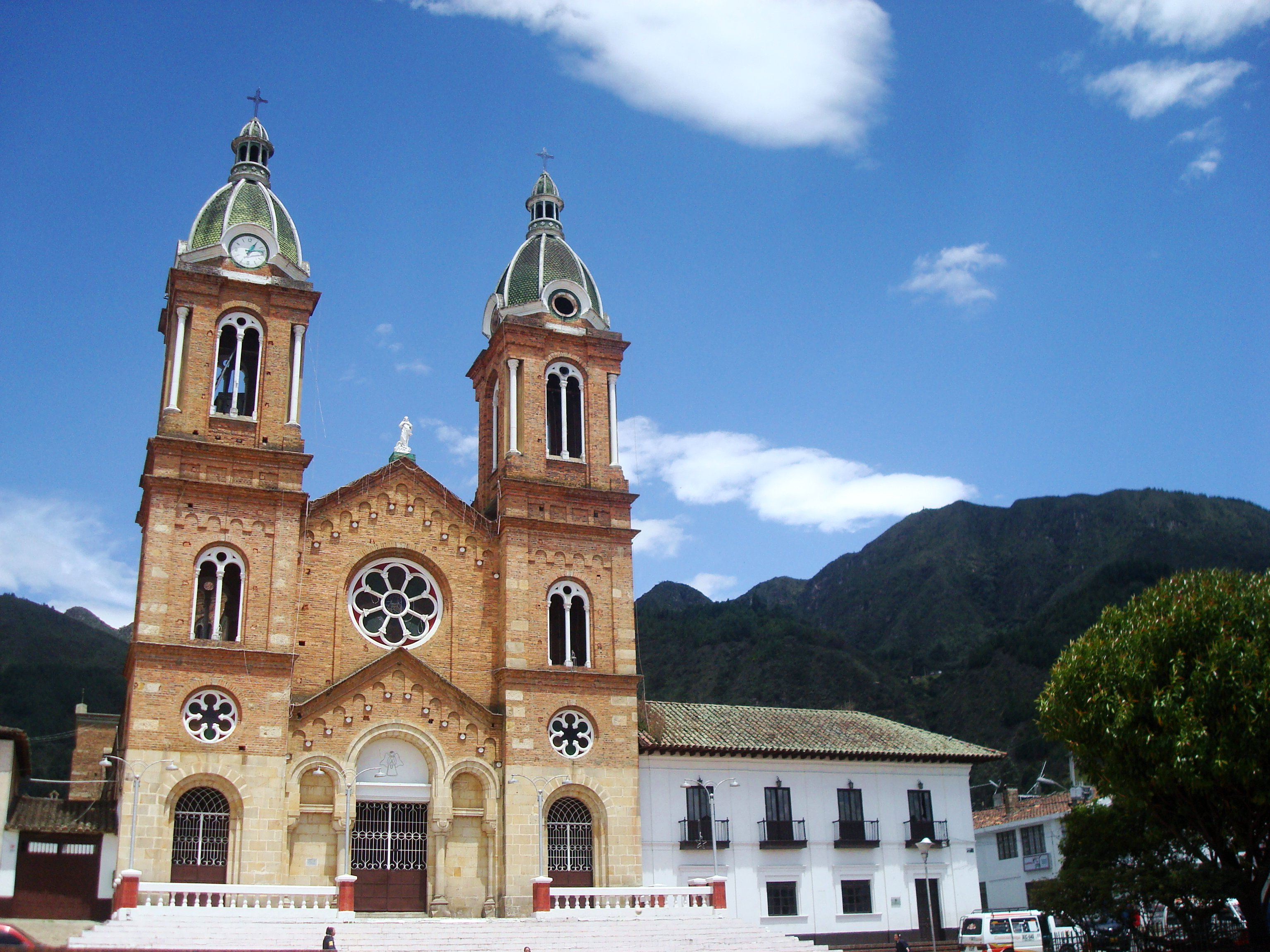 Ubicación: SESQUILE, CUNDINAMARCA